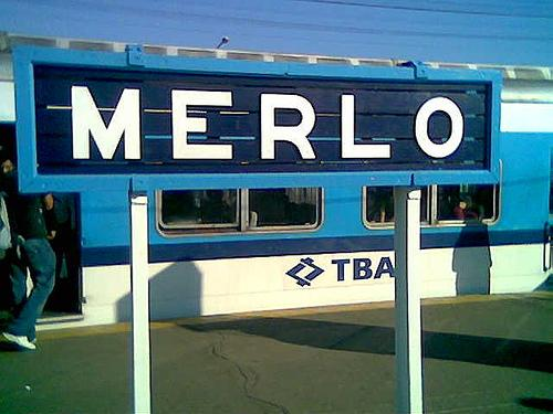 Estación Merlo